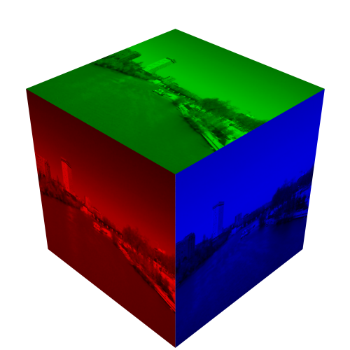 Esto es una representación de los colores de una imágen con un modo de color RGB. Lo hize con el GIMP, con la función de mapear objeto. La foto original es esta: Rio Pisuerga